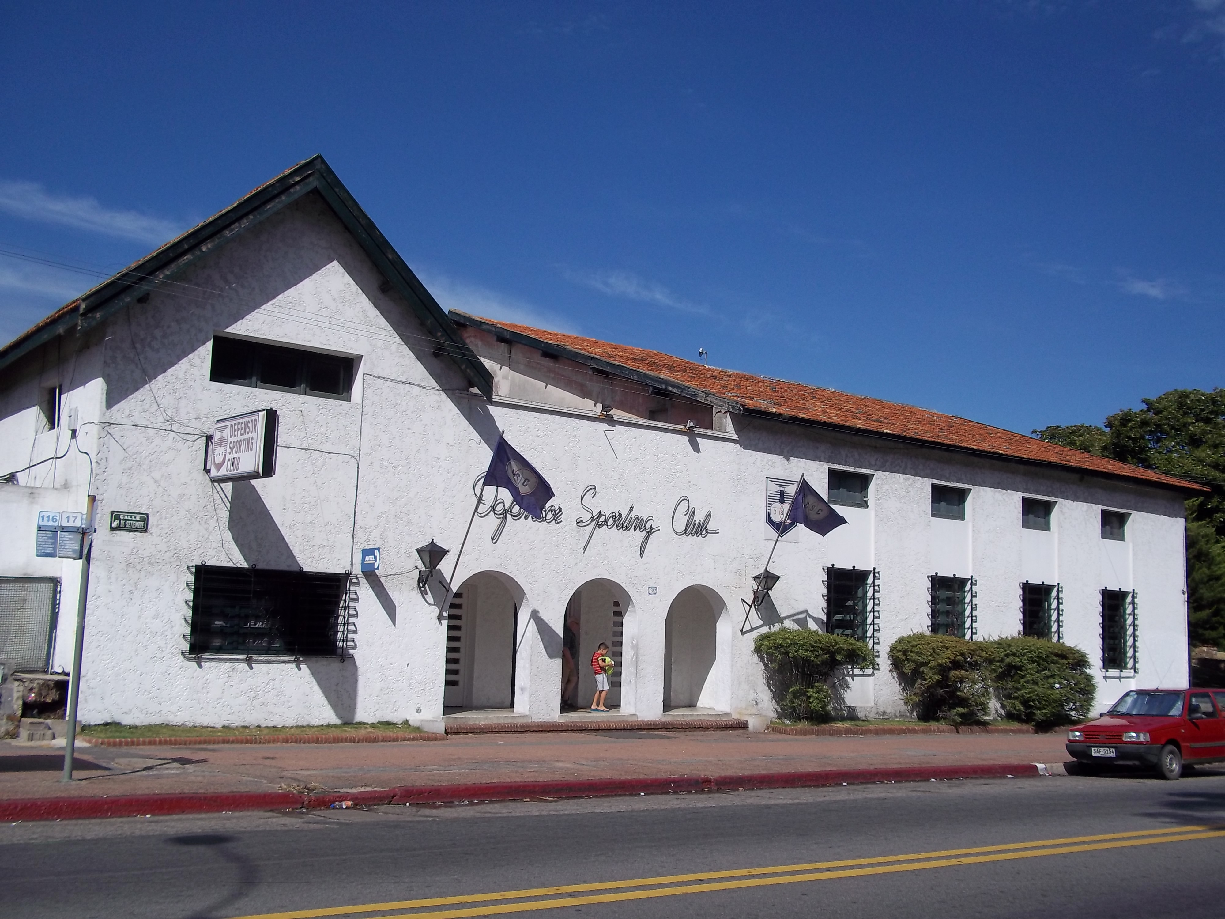 Edificio del Defensor Sporting Club, en 21 de setiembre 2362, Parque Rodó, Montevideo, Uruguay.